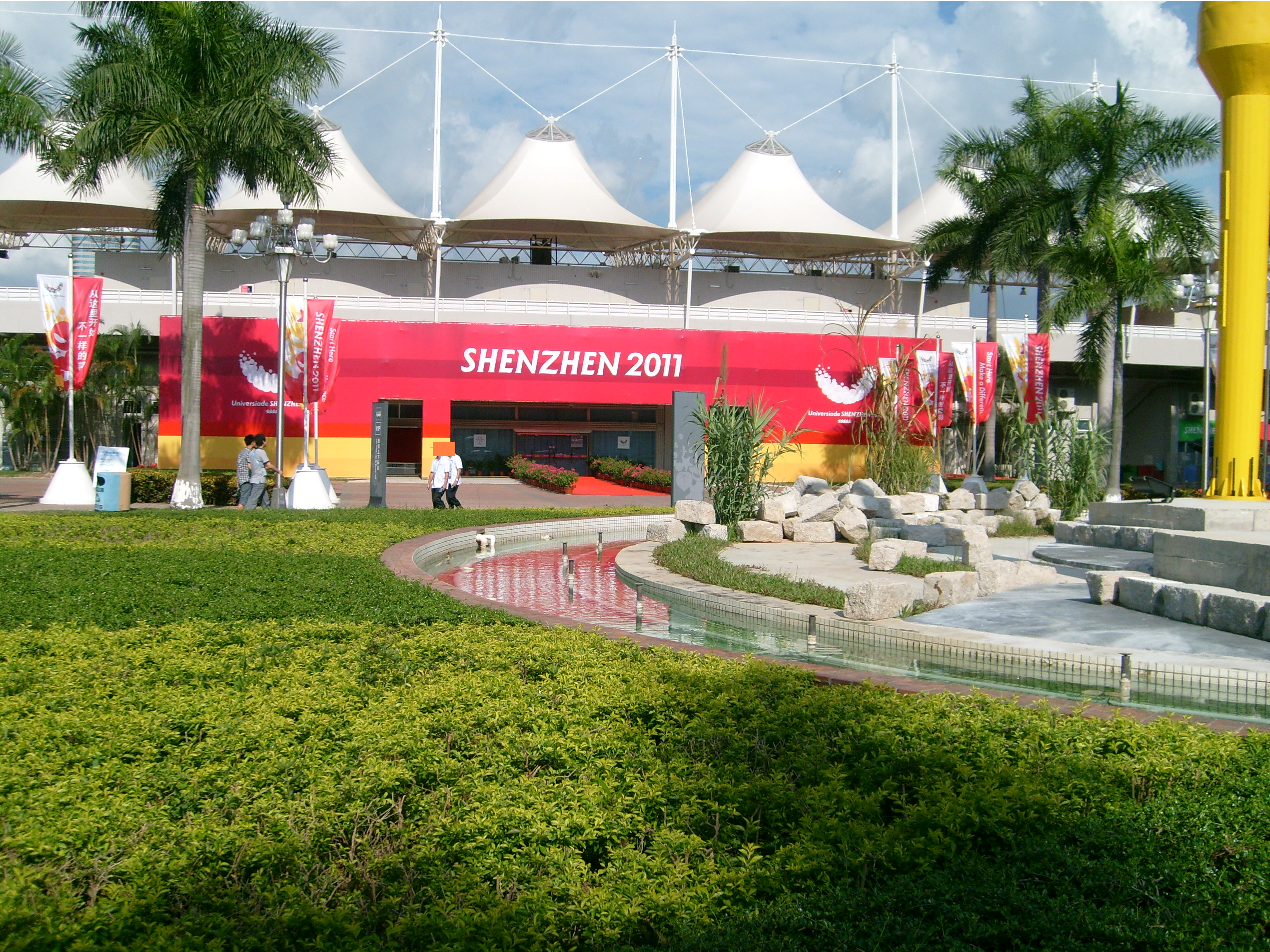 深圳大运足球赛场之一